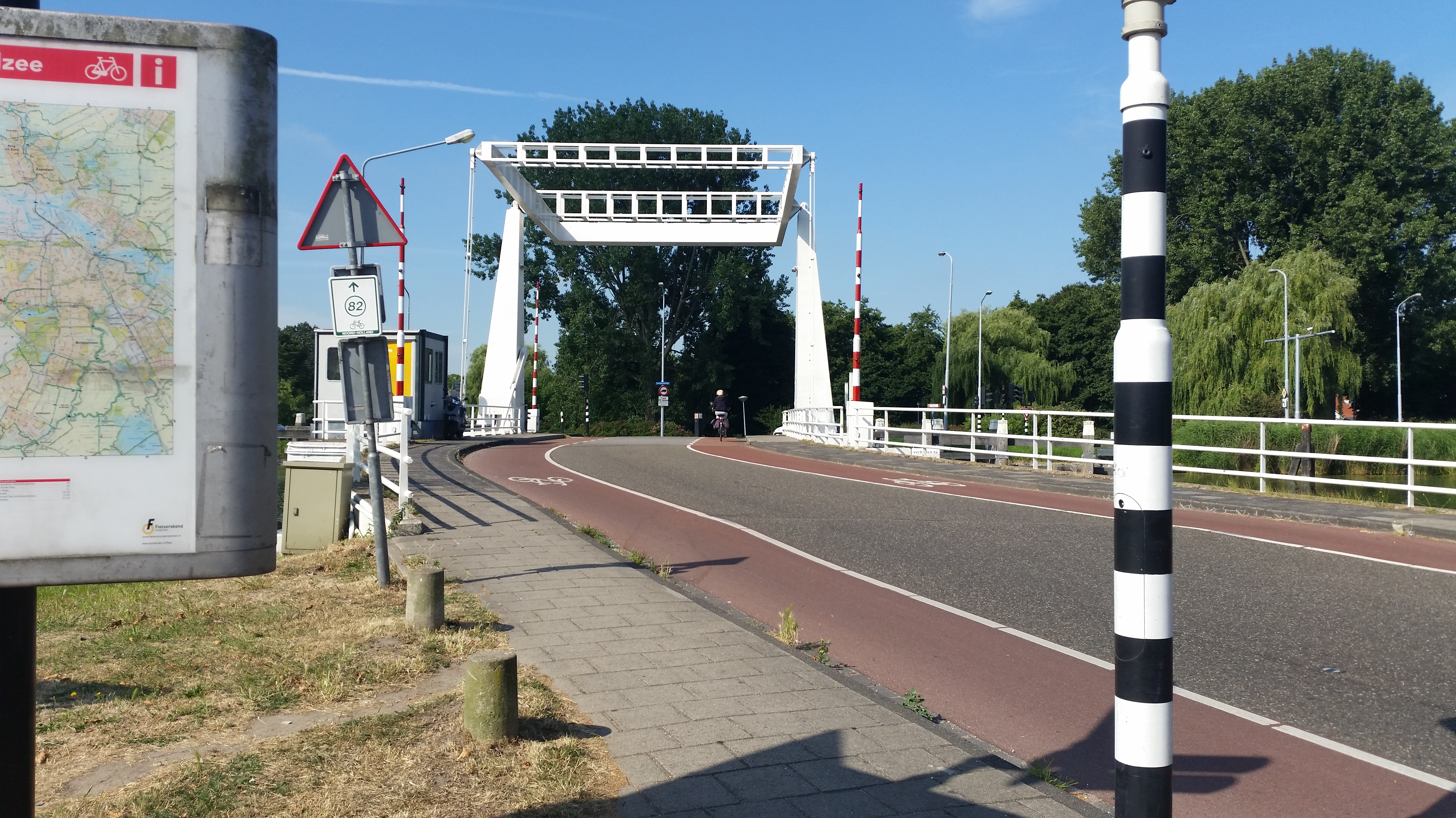 Sloterbrug, overzicht